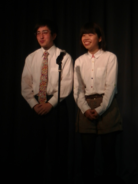 おとぎばなし (お笑いコンビ) 2018年11月